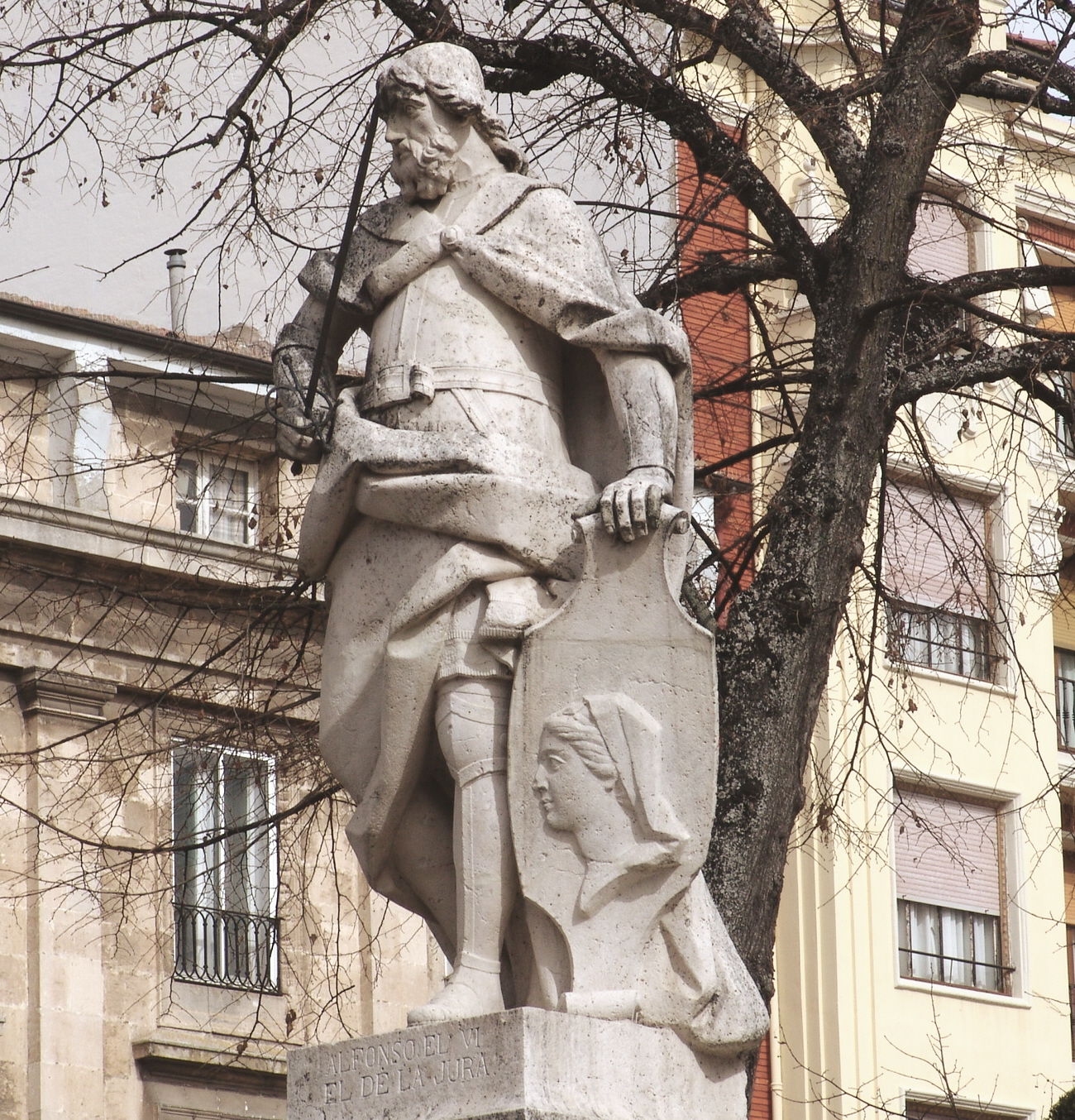 Estatua de Alfonso VI, el de la Jura. Paseo del Espolón, Burgos, España.